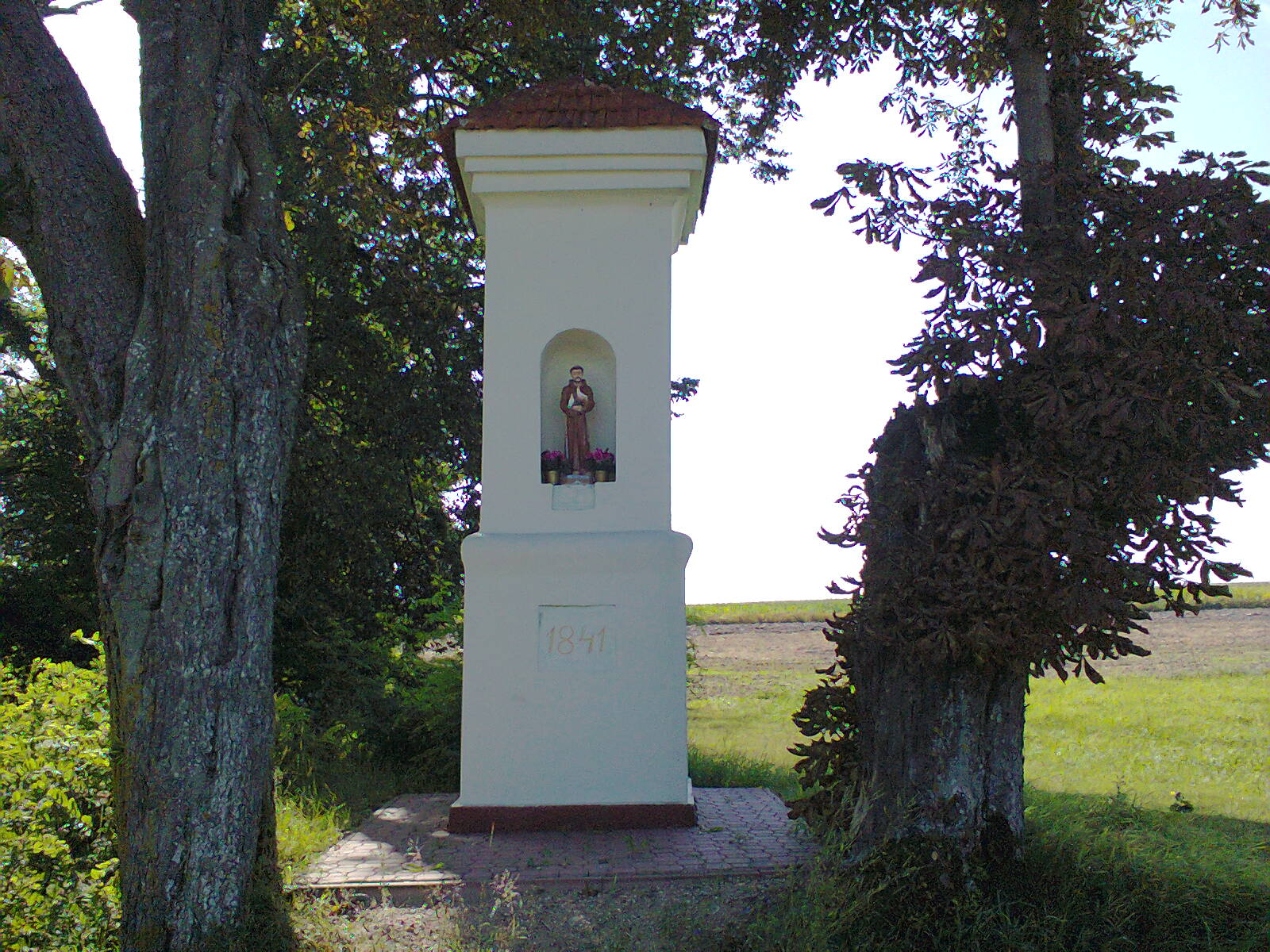 Romany - przydrożna kapliczka